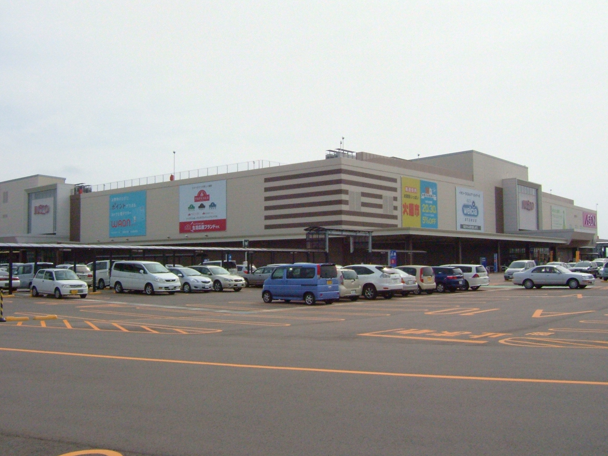 イオンモールかほく（石川県かほく市）